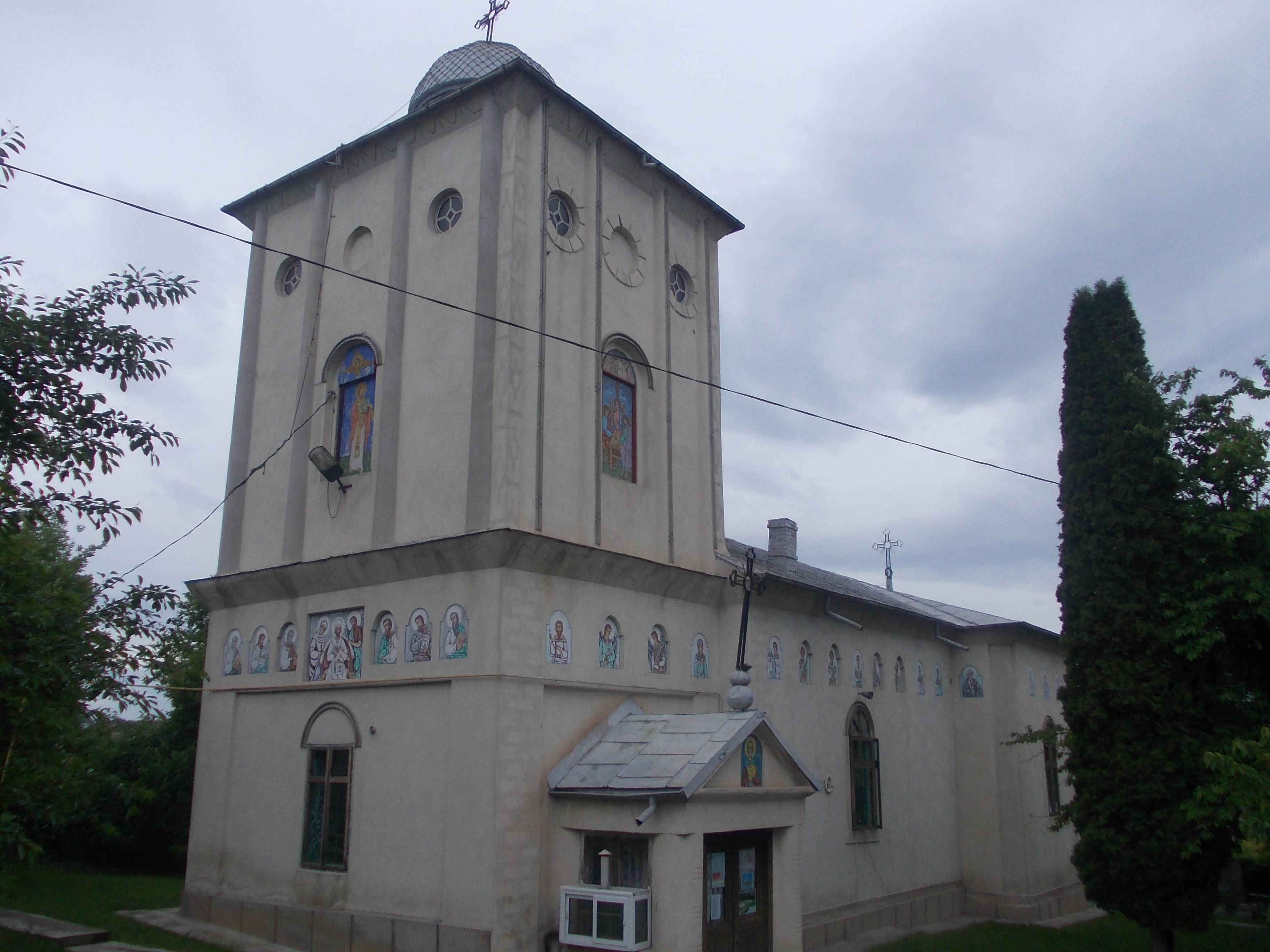 Biserica „Sf. Nicolae” din Târgu Frumos 01